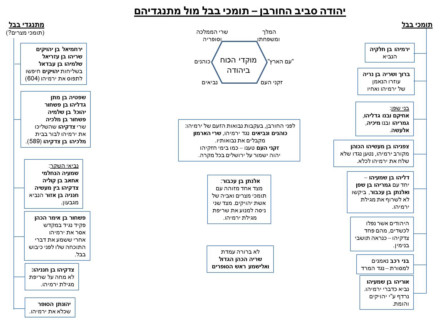 המחנות הפוליטיים ביהודה סביב חורבן בית ראשון על פי המתואר במקרא